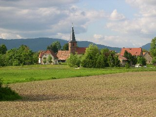 Village de Larivière (Territoire de Belfort) Photo prise en mai 2004 par LP90 Copyright : licence GFDL LP90 mai 2004